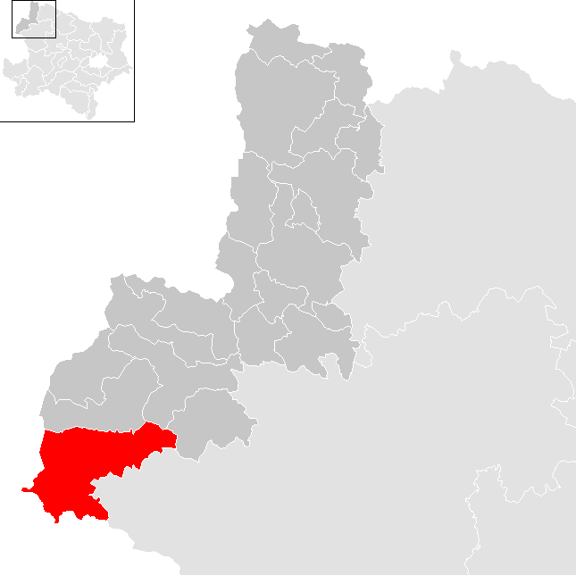 Bezirk Gmünd